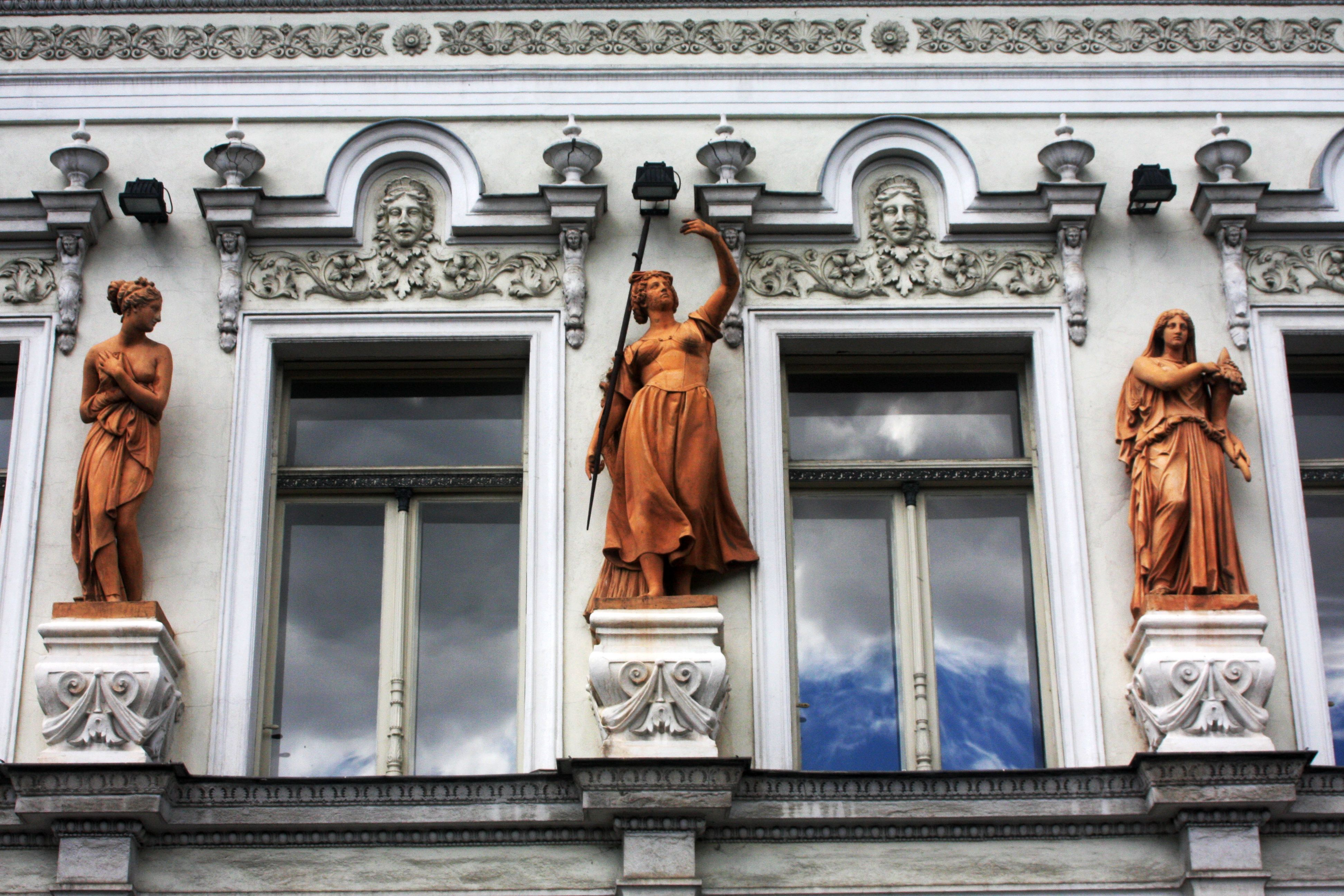 Starogard Gdański, pałac, 1880